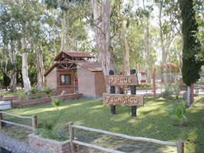 Fotografía del parque faunístico de la provincia de San Juan, Argentina